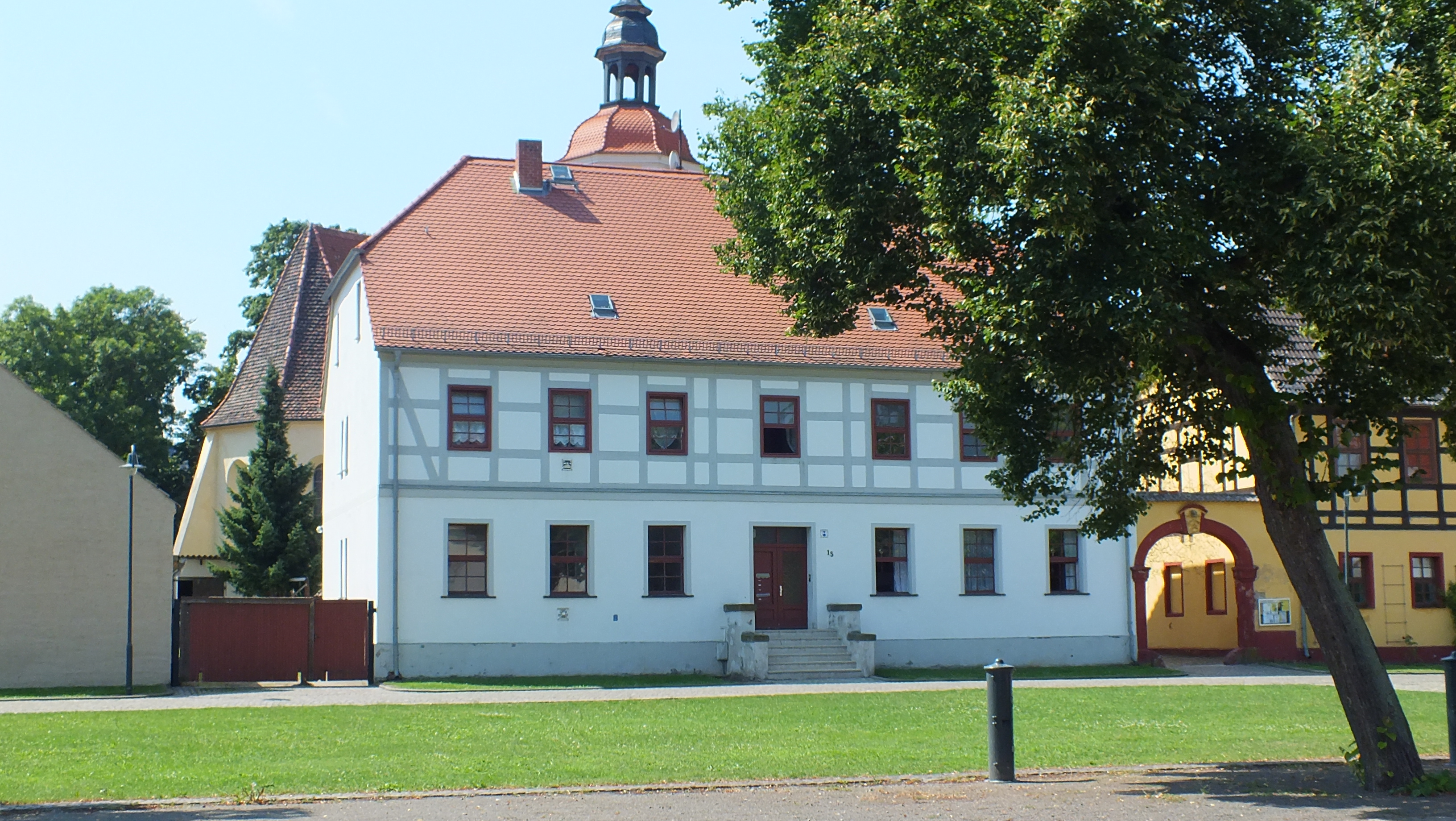 Gebäude der ehemaliger Schule in Annaburg (Markt 23 )